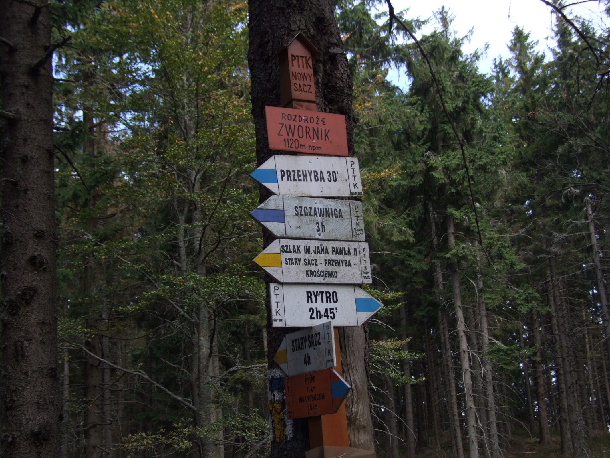 Tabliczki szlaków turystycznych na rozdrożu Zwornik pod Wielką Przehybą